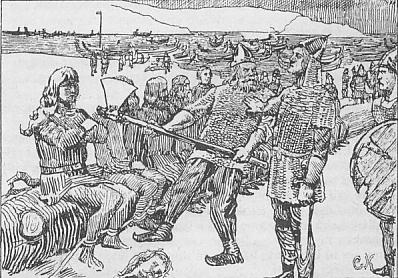 Sigurðr Búason is spared by Eiríkr jarl after the battle of Hjörungavágr.